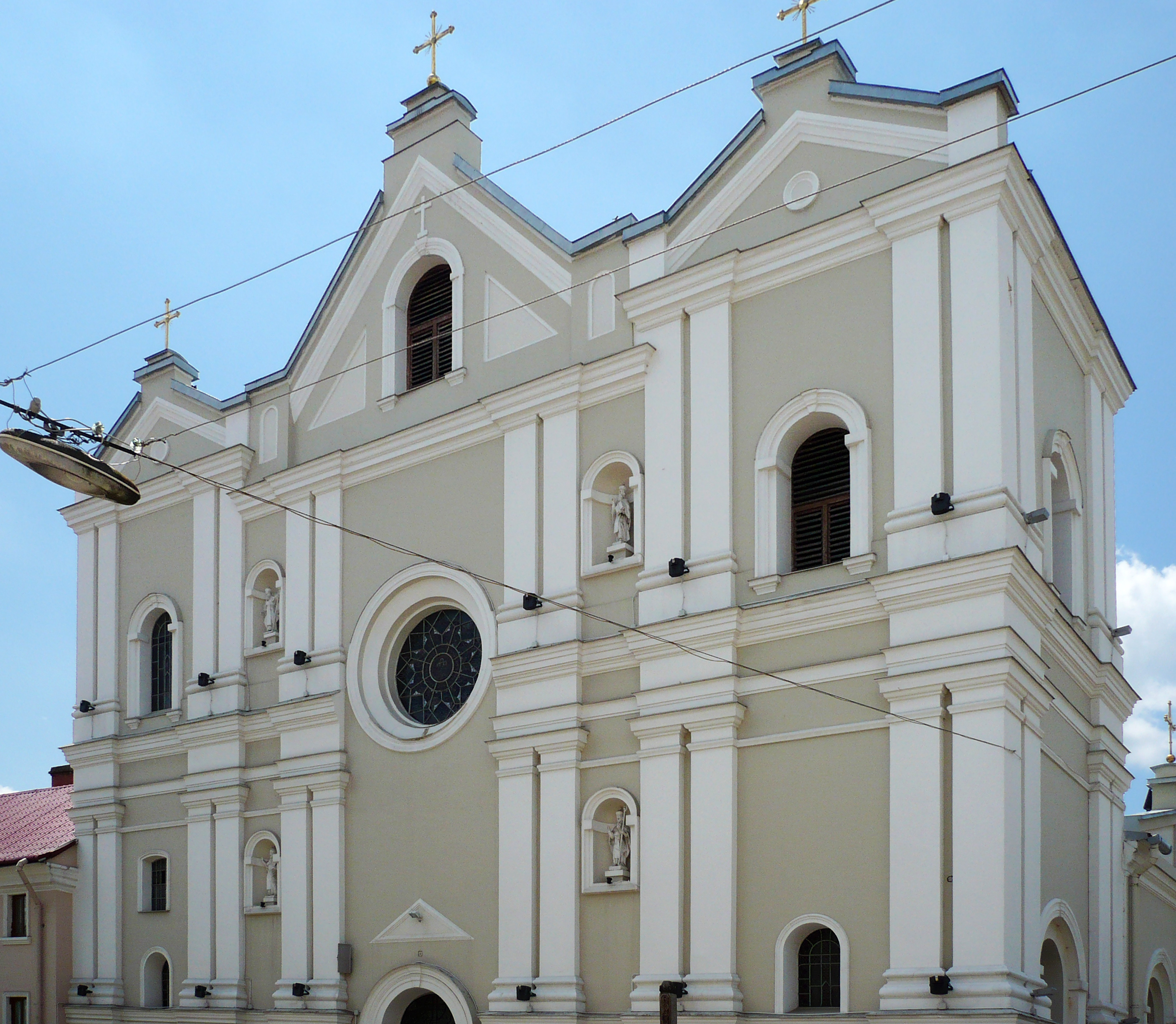 Kościół pw. św. Michała, ob. cerkiew gr.kat. pw. Trójcy Przenajświętszej